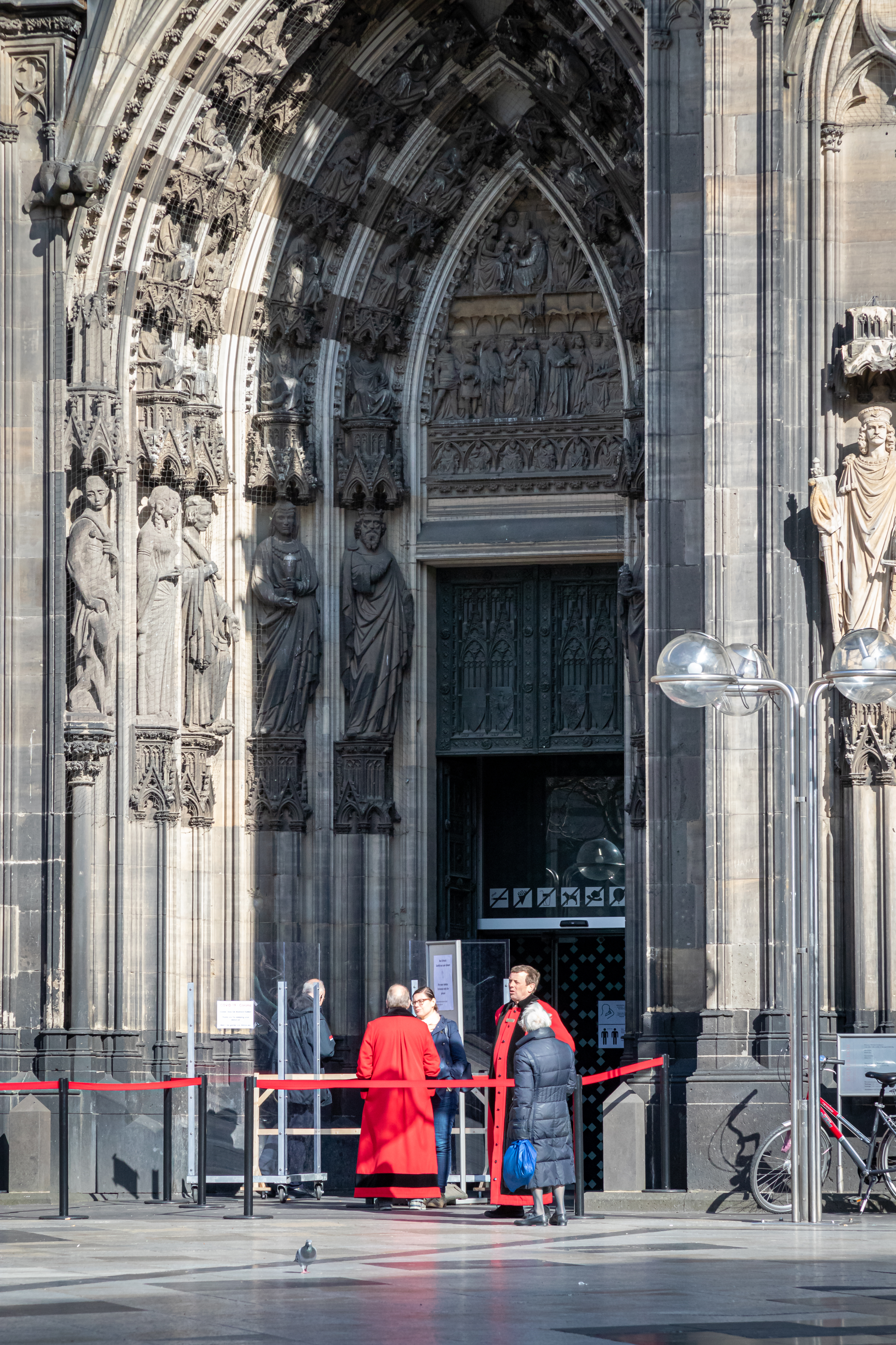 Einlasskontrolle am Kölner Dom aufgrund der Covid-19-Pandemie